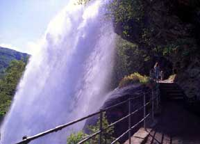 Steindalsfossen, Norway